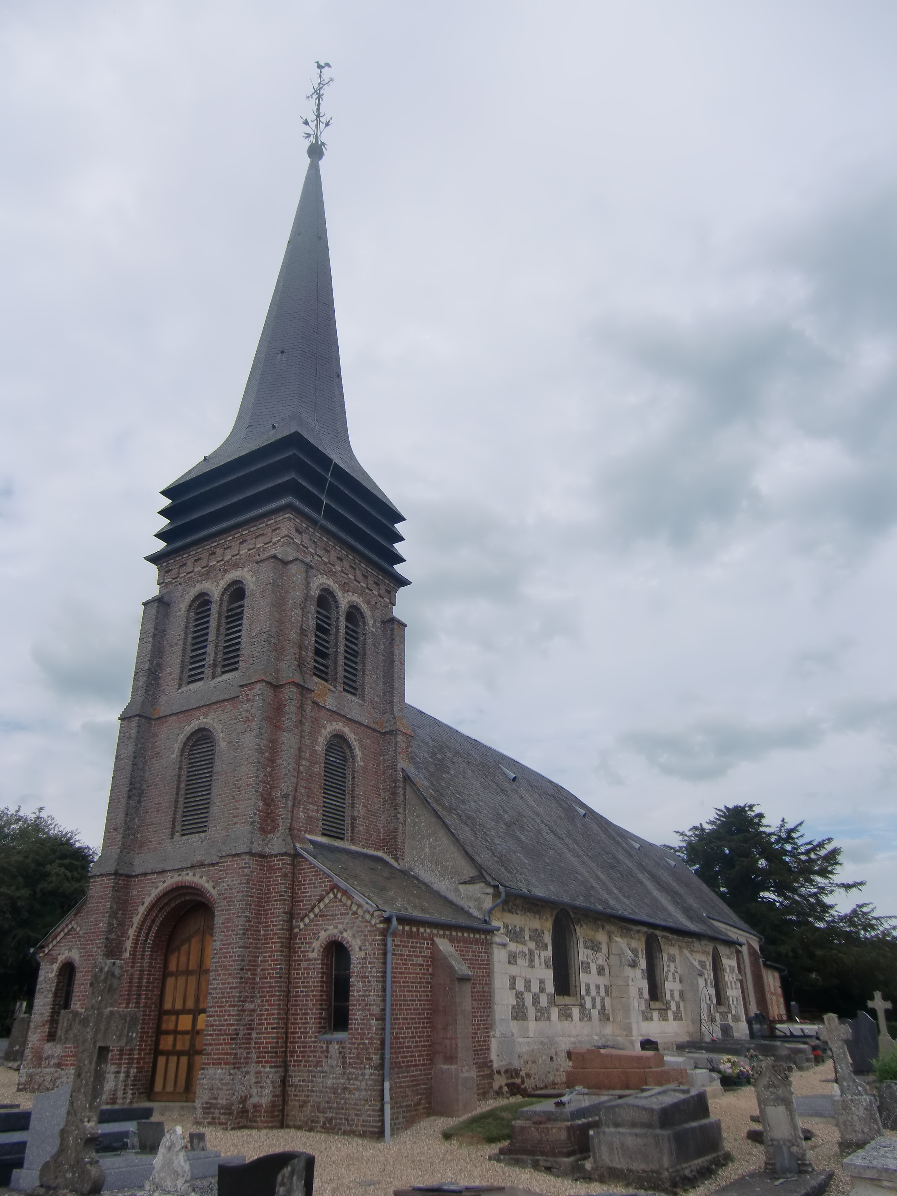 Eglise de Saint Grégoire du Vièvre (Eure, Normandie, France)